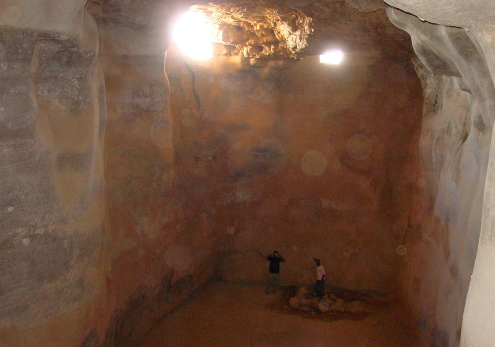 Цистерне за скупљање кишнице, Масада, Израел (слику направио Борис Малагурски) ☺ Ову слику је направио Борис Малагурски.